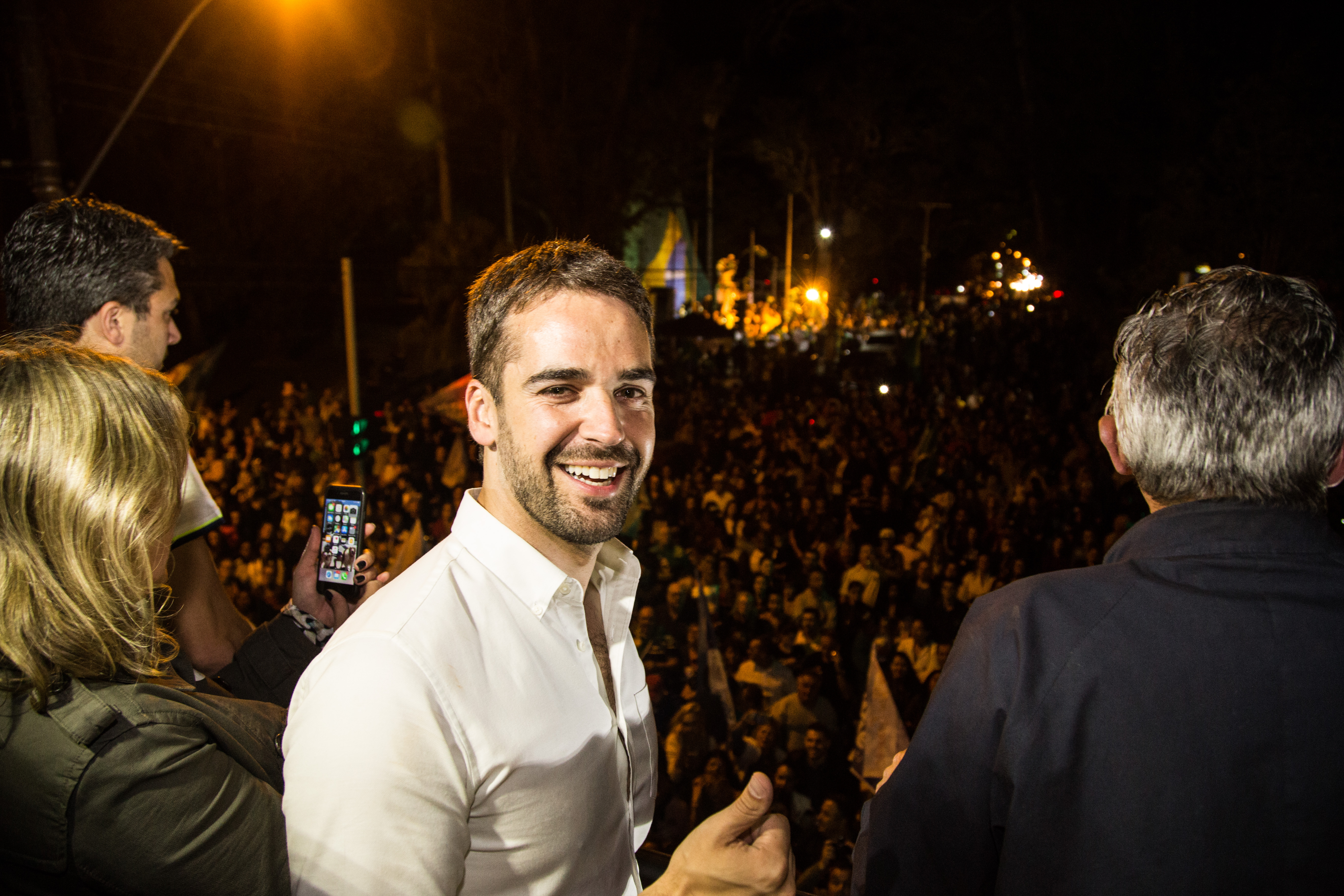 Eduardo Leite comemorando sua eleição como governador do Rio Grande do Sul em 2018.